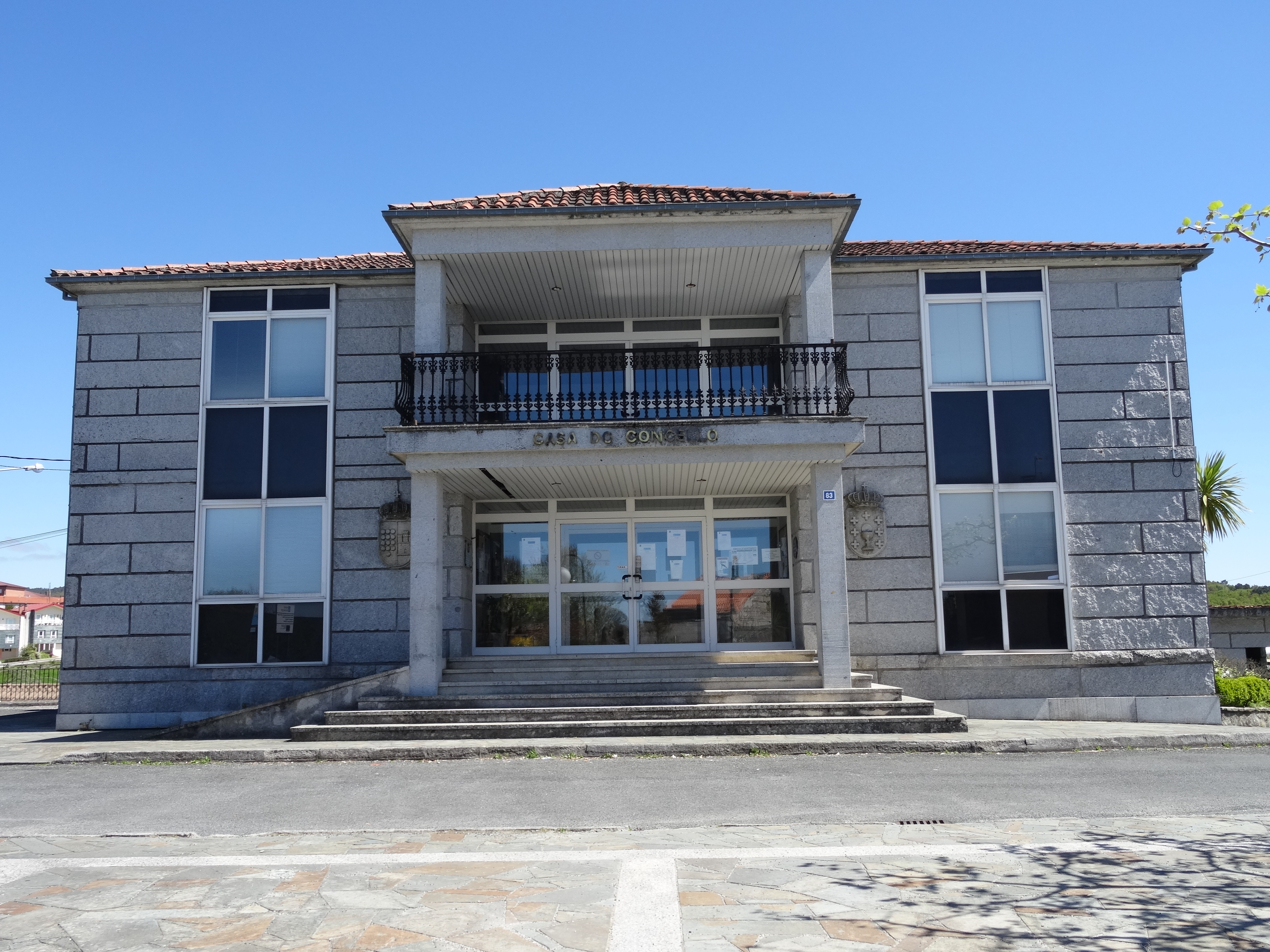 Casa do concello da Peroxa.